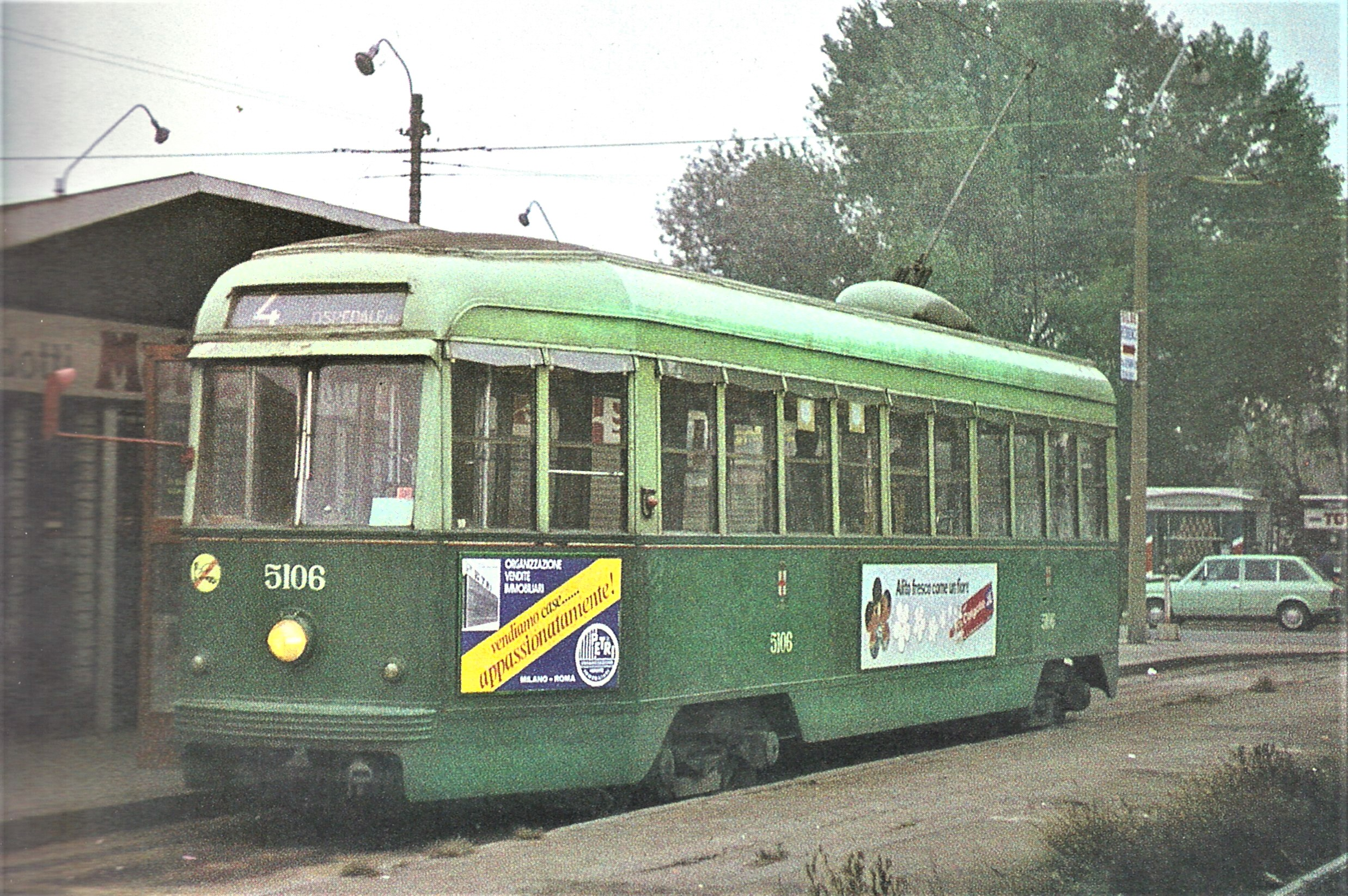 Autore: anonimo Fonte: archivi municipali Milano Descrizione: Milano, vettura tranviaria nella livrea del 1950 Licenza d'uso: foto non artistica scattata in Italia oltre 20 anni fa Note